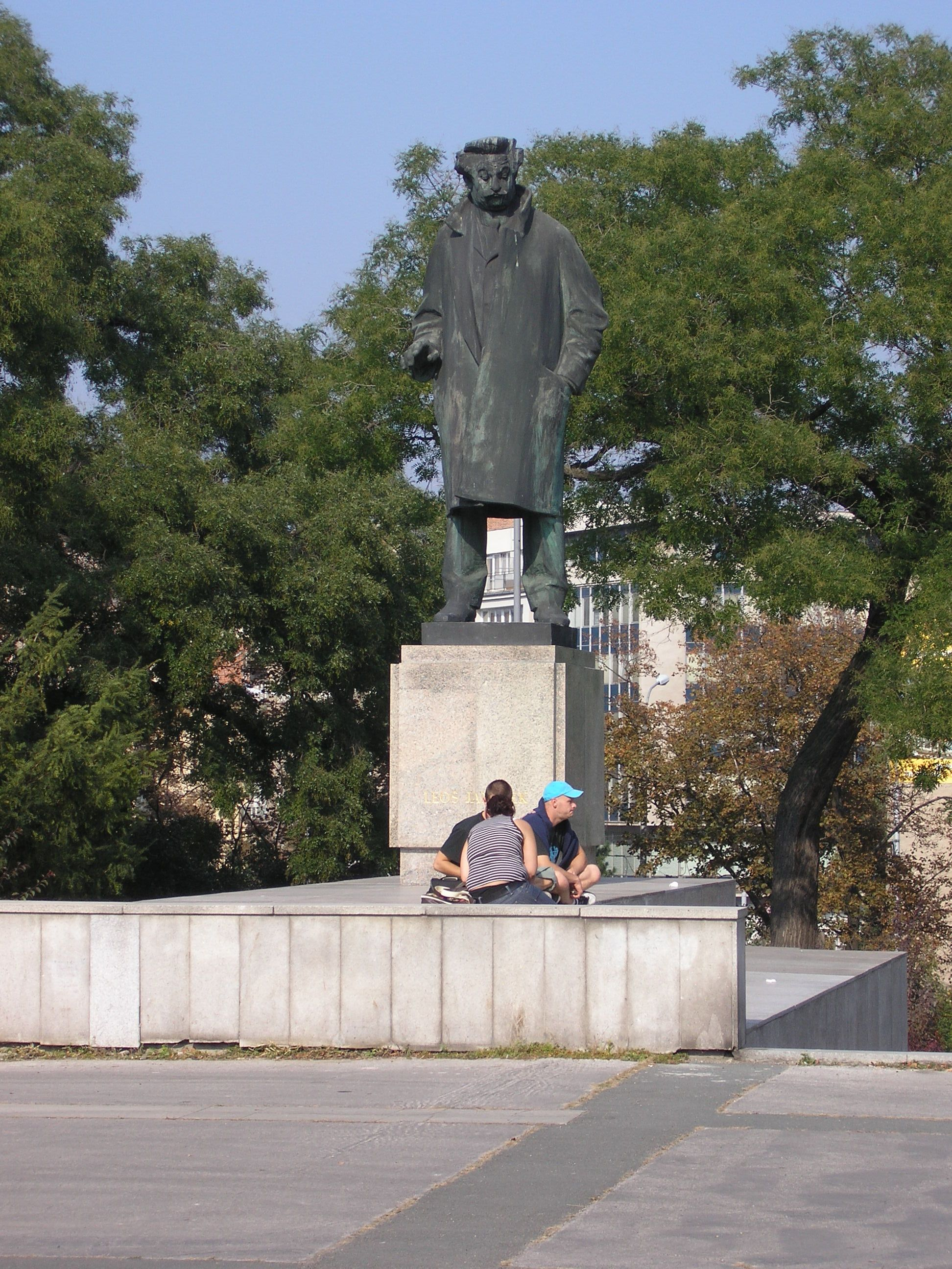 Socha Leoše Janáčka u Janáčkova divadla